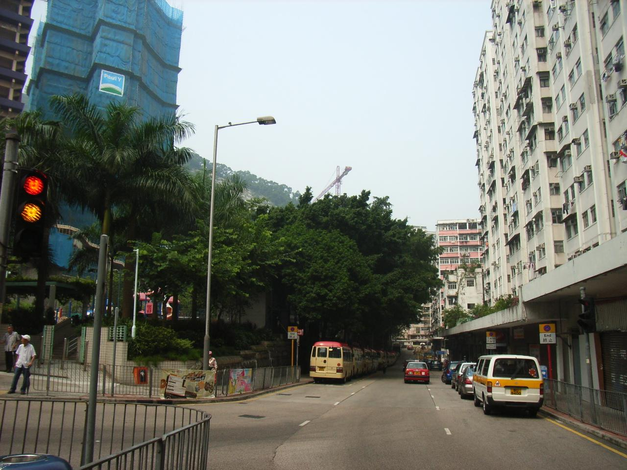 Forbes Street, 科士街, Kennedy Town, Hong Kong (By KennethTom).